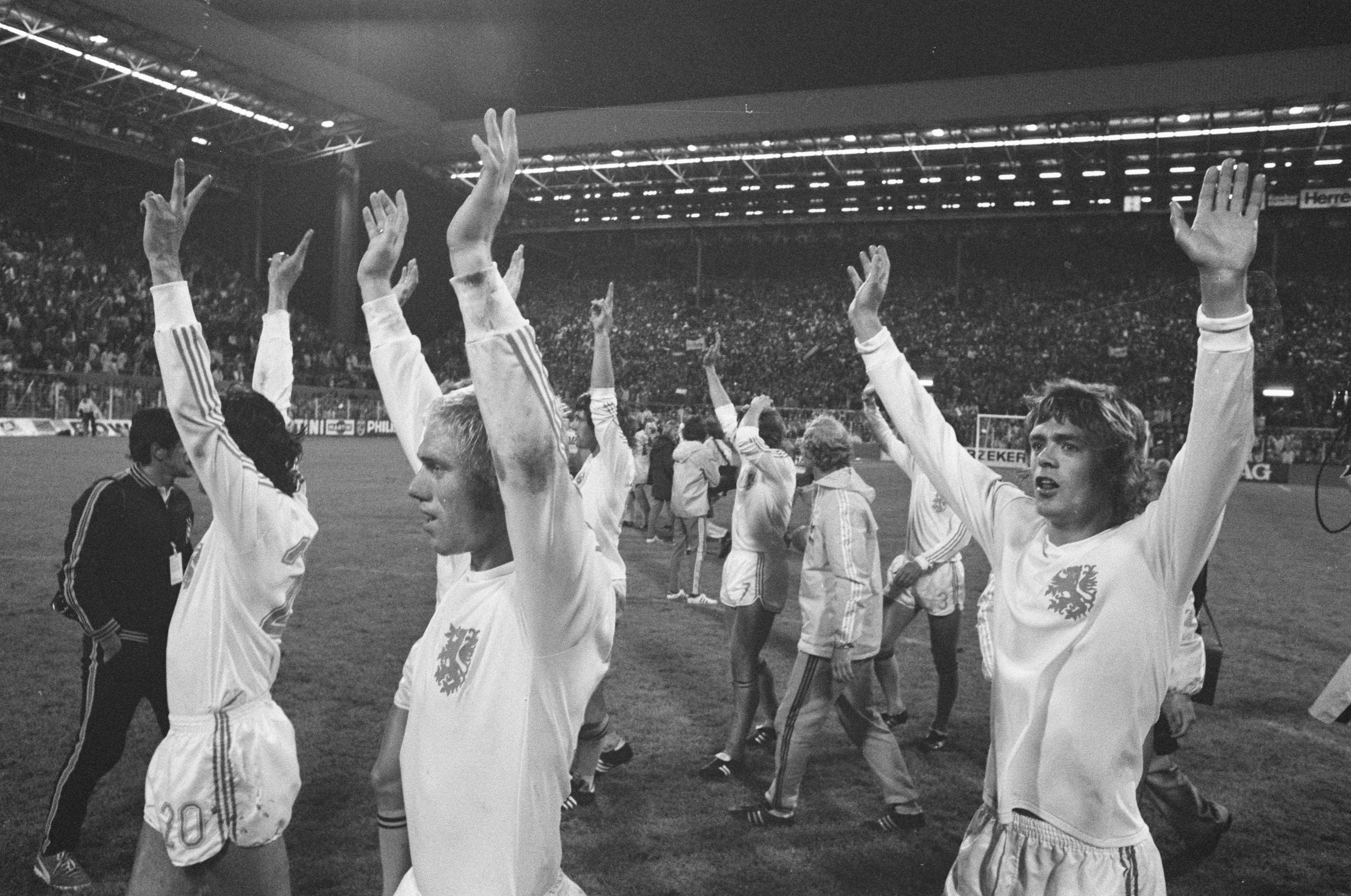 Collectie / Archief : Fotocollectie Anefo Reportage / Serie : [ onbekend ] Beschrijving : WK 74 Nederland tegen Brazilie 2-0, juichende spelers bedanken publiek. Links Ruud Geels, rechts Johnny Rep Datum : 3 juli 1974 Locatie : Dortmund Trefwoorden : sport, voetbal Persoonsnaam : Geels Ruud, Rep, Johnny Fotograaf : Verhoeff, Bert / Anefo Auteursrechthebbende : Nationaal Archief Materiaalsoort : Negatief (zwart/wit) Nummer archiefinventaris : bekijk toegang 2.24.01.05 Bestanddeelnummer : 927-3022